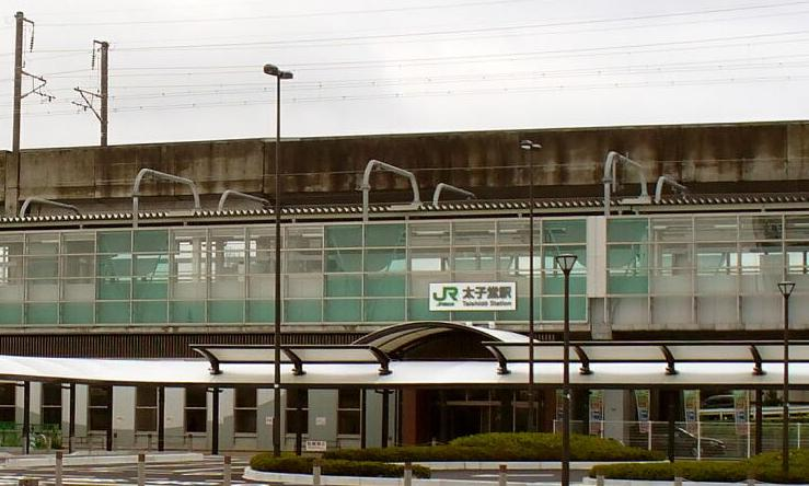 太子堂駅 Taishido Station. East Japan Railway Co.